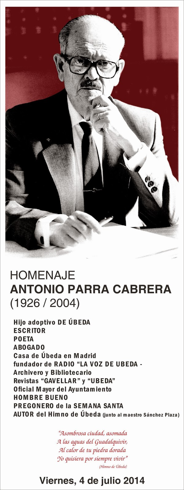 Cartel